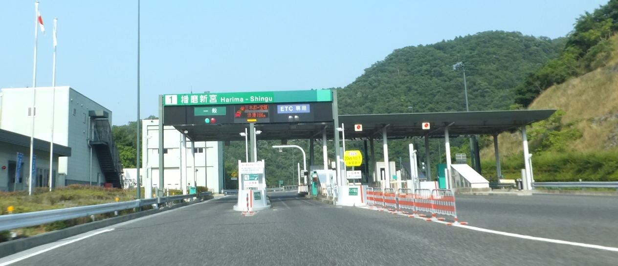 播磨新宮インターチェンジ